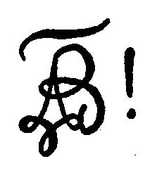 Zirkel der Weinheimer Inaktivenvereinigung Bowkia an der Technischen Hochschule Danzig